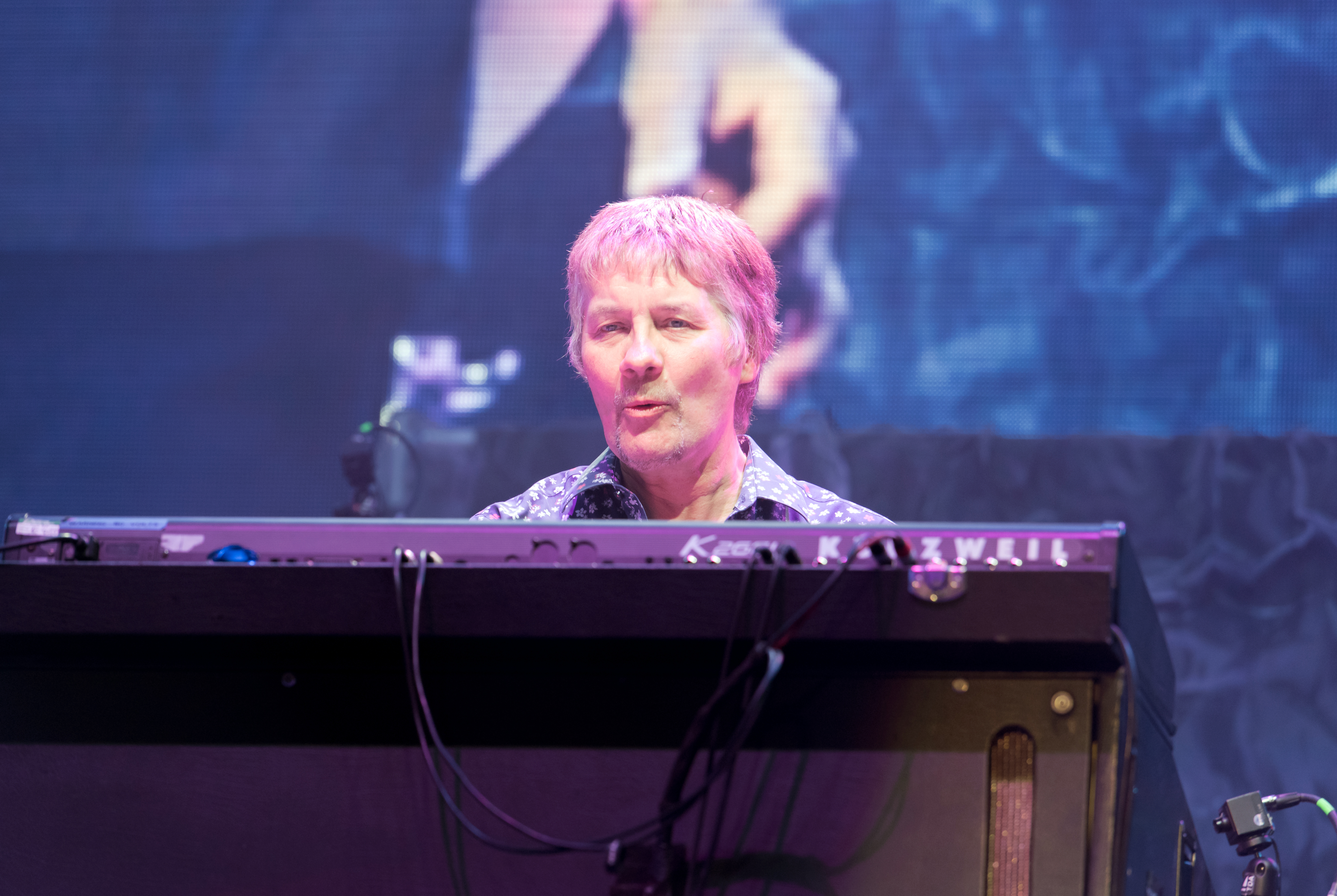 Don Airey von Deep Purple bei der inFinite "The Long Goodbye Tour" in der Barclaycard Arena in Hamburg 2017